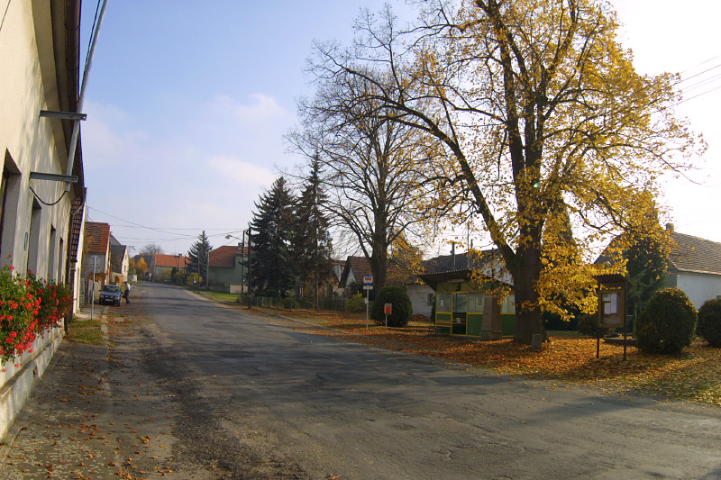 Náves ve Slatině, okres Plzeň-sever.